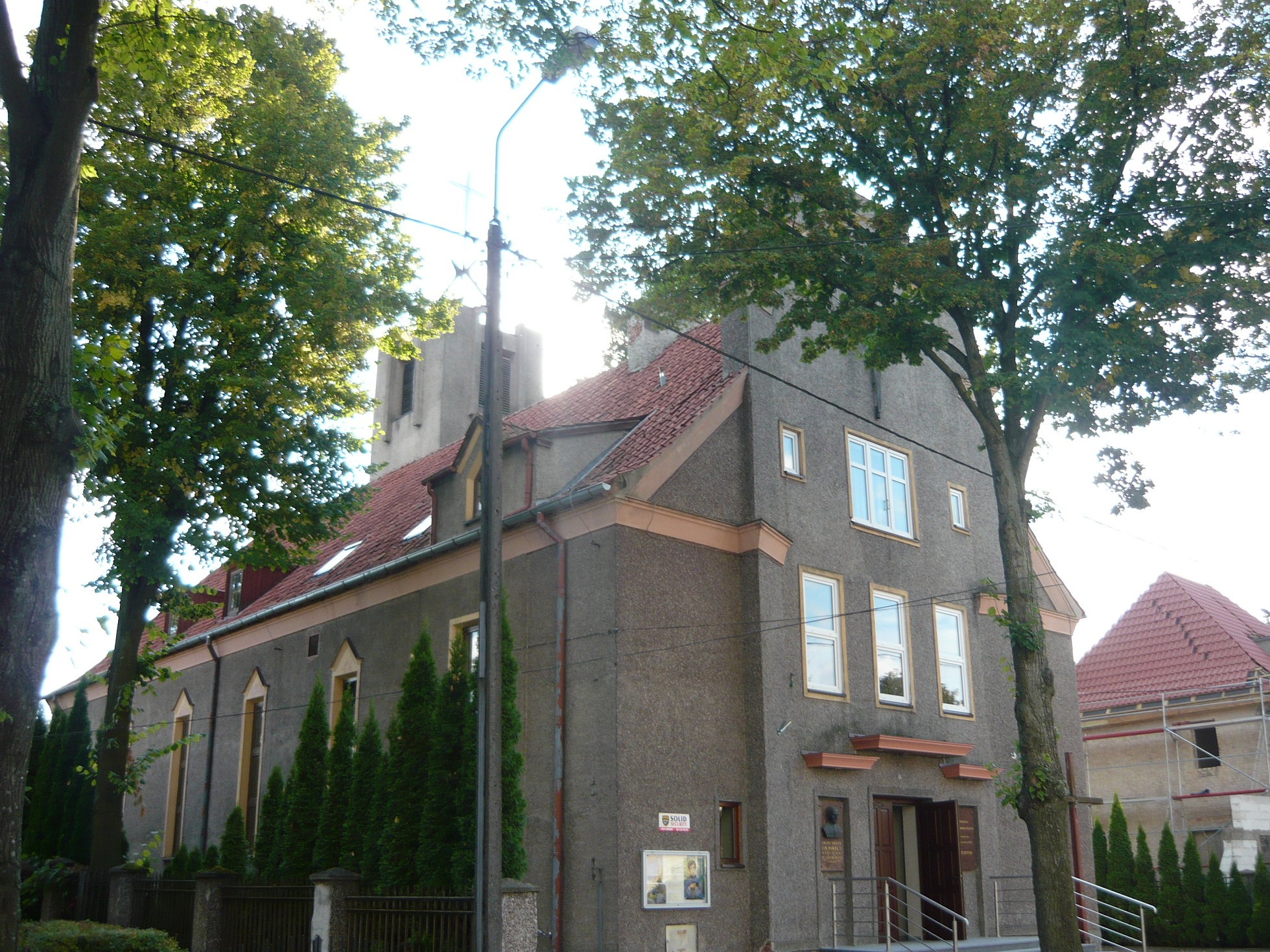 Szczytno, ul. Niepodległości 11 - dawny kościół ewangelicki, obecnie rzymskokatolicki parafialny p.w. św. Stanisława Kostki, 1928-19312 03.1998.